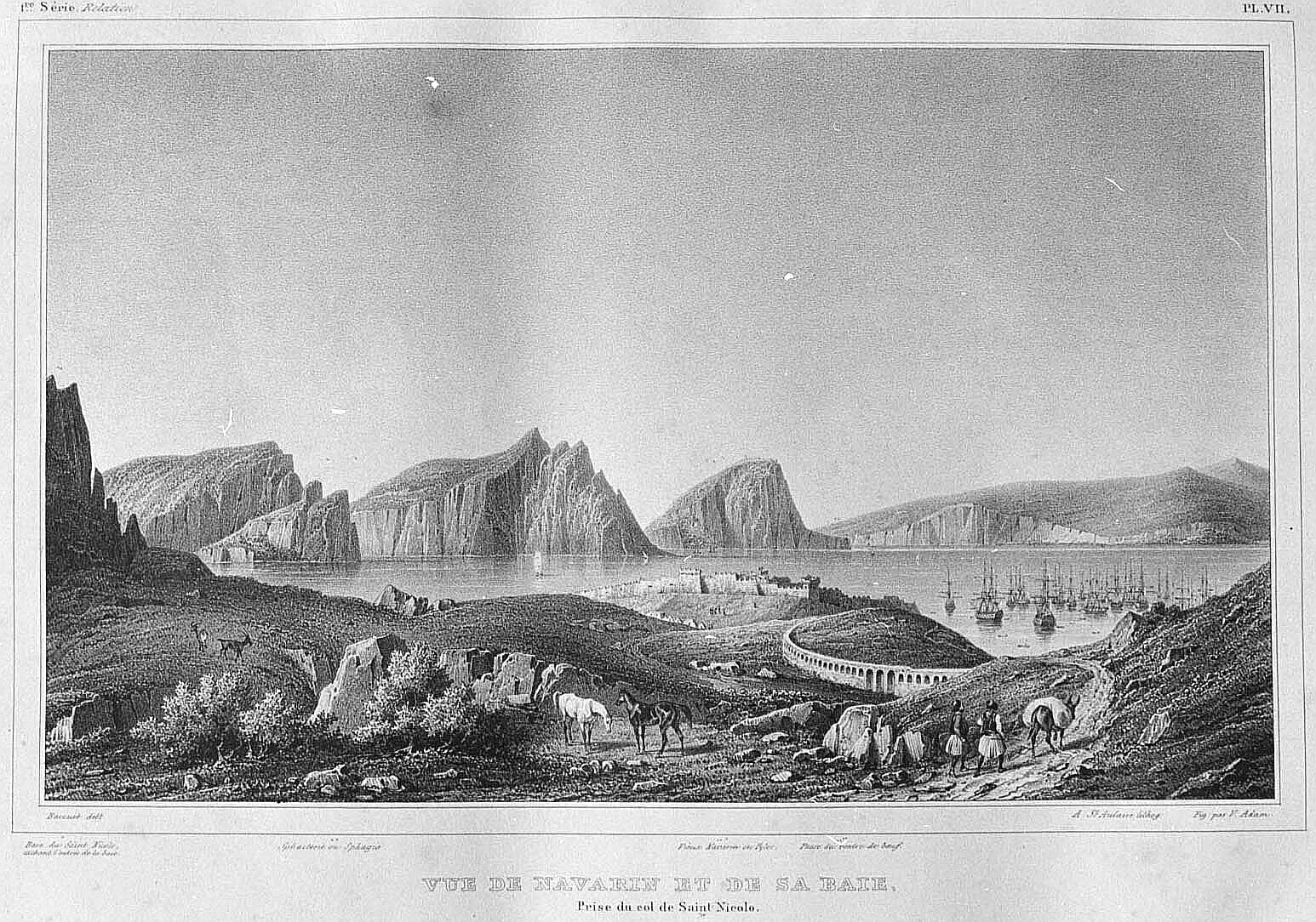 Vue de Navarin et de sa Baie prise du col de Saint Nicolo (garvure de Prosper Baccuet)